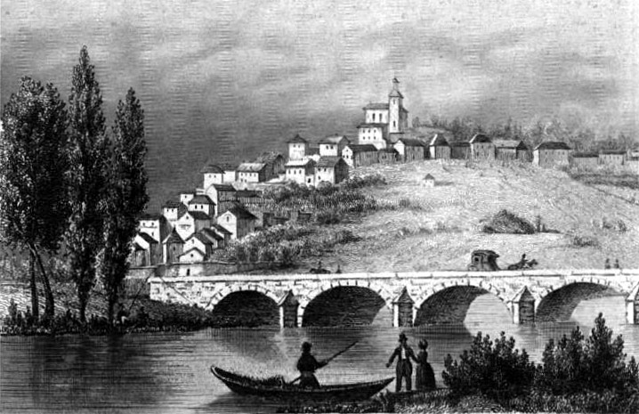 « Bourmont » Image en provenance du livre : Eusèbe Girault de Saint-Fargeau, Guide pittoresque du voyageur en France, contenant la statistique et la description complète des quatre-vingt-six départements, orné de 740 vignettes et portraits gravés sur acier, de quatre-vingt-six cartes de départements et d'une grande carte routière de la France, par une Société de gens de lettres, de géographes et d'artistes, Paris, F. Didot frères, 1838, 6 volumes in-8° (BNF : 8-L25- 46). Volume III Route de Paris à Nice traversant les départements de l'Isère, des Hautes-Alpes, des Basses-Alpes et du Var. auteurs dessins : Rauch (ou autre) auteurs gravures : Skelton fils, Schroeder, Bishop (ou autre)